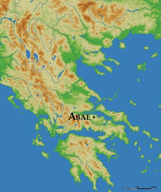 Locatie van Abae.